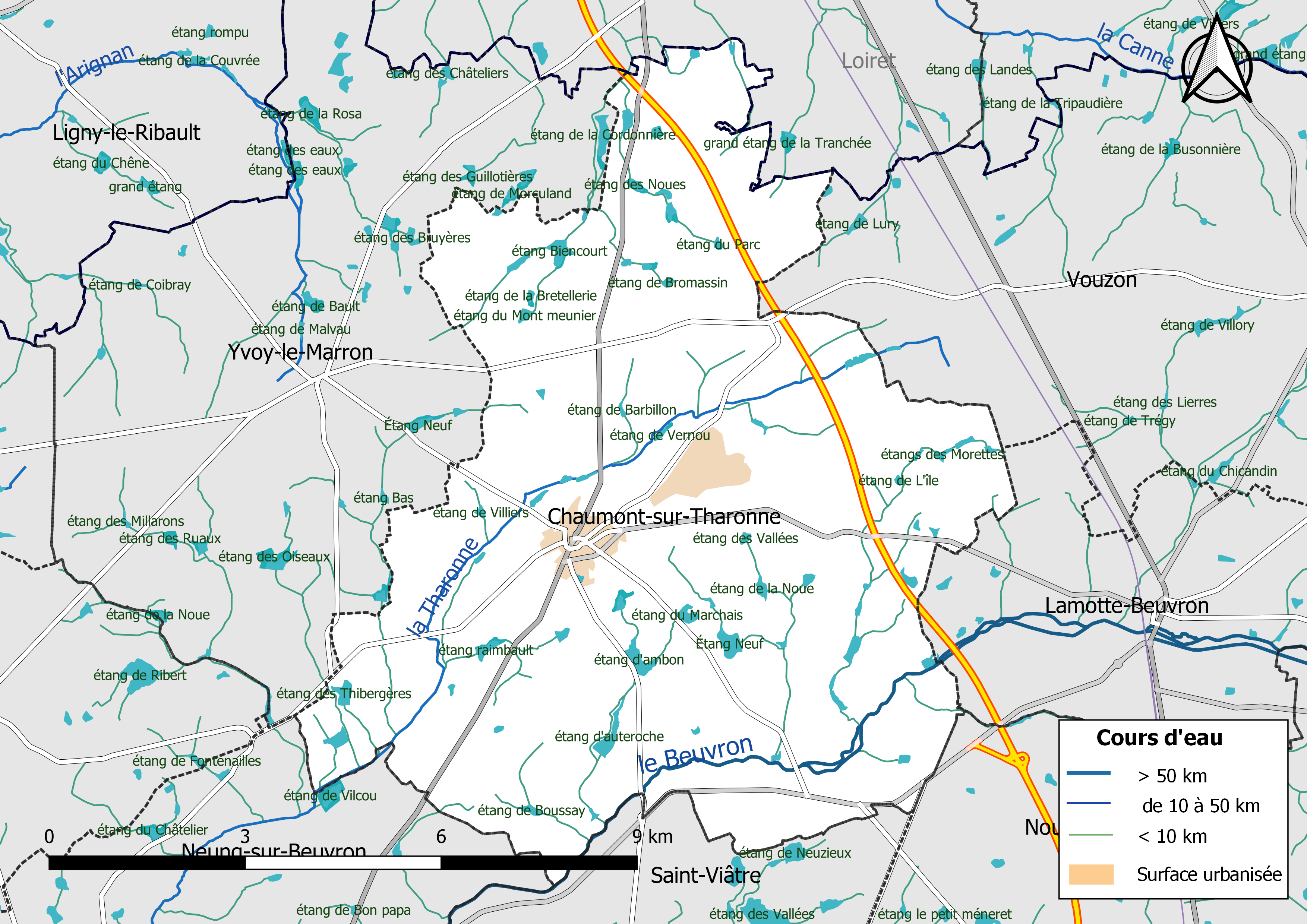 Carte du réseau hydrographique de la commune de Chaumont-sur-Tharonne (Loir-et-Cher, France).